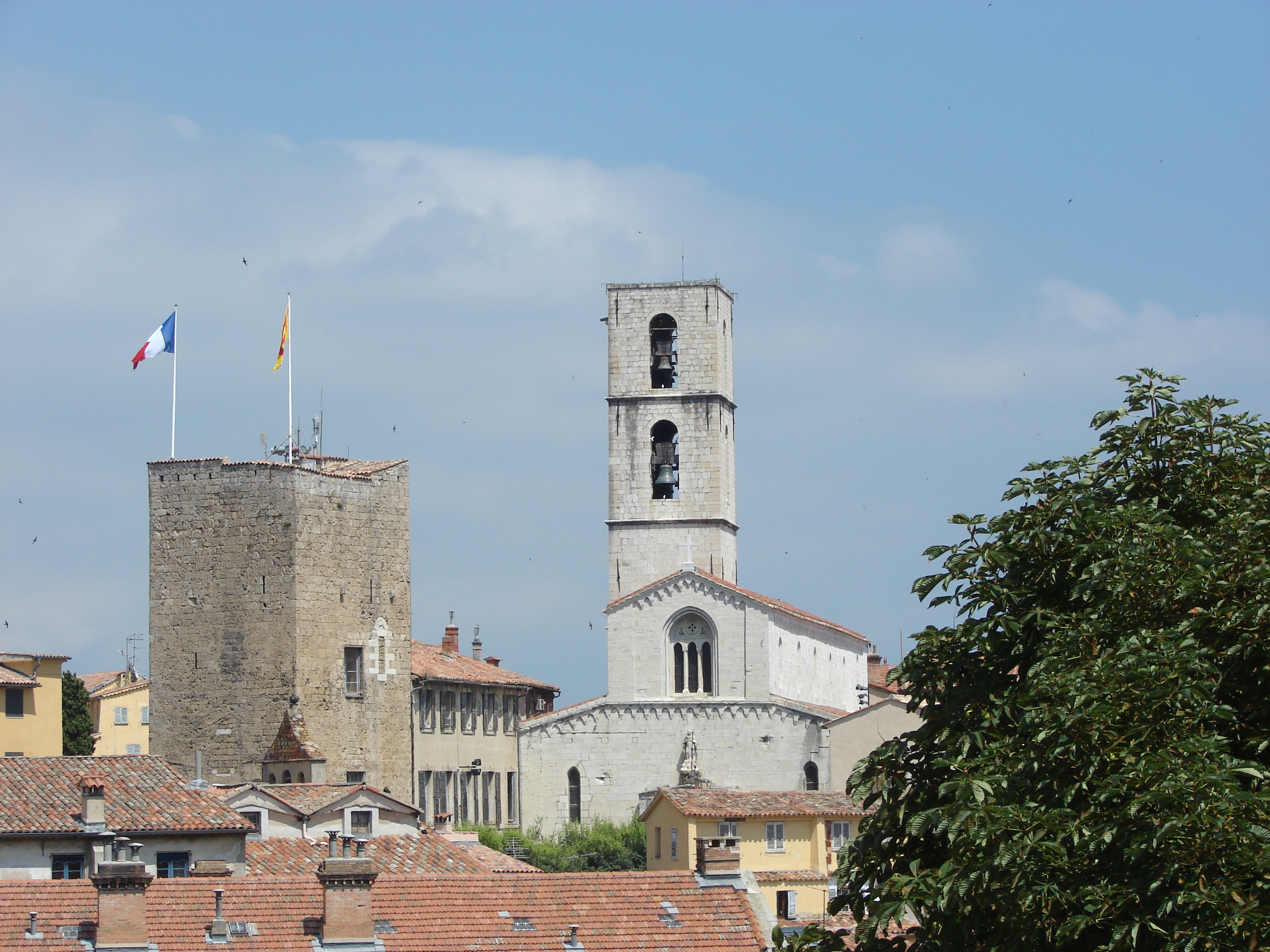 Cathédrale Notre-Dame-du-Puy de Grasse, Grasse